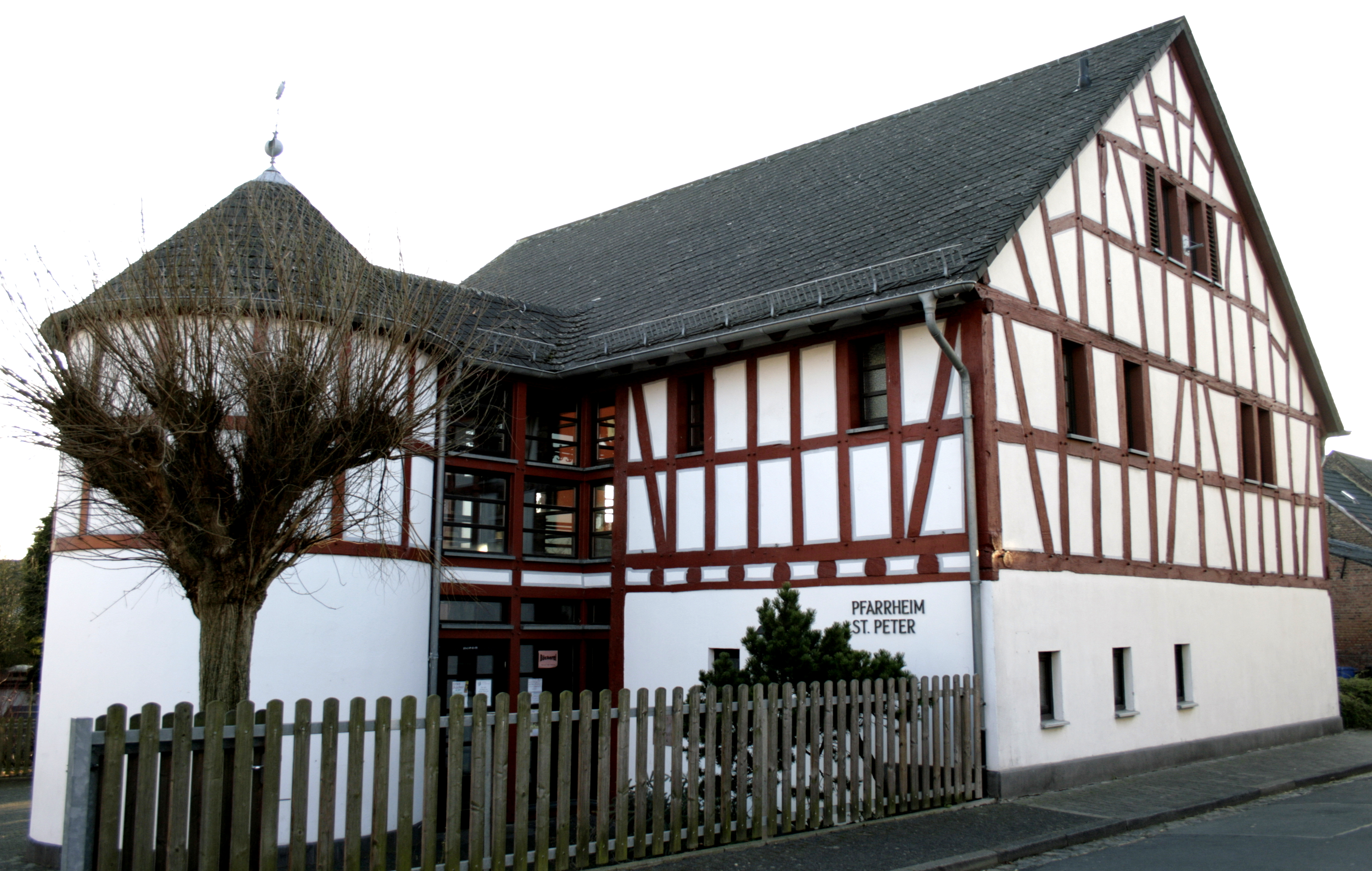 Pfarrheim in Hadamar-Niederzeuzheim, Deutschland, ehemals Zehntscheune